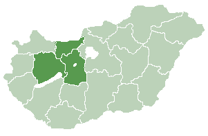 Közép-Dunántúl region of Hungary.